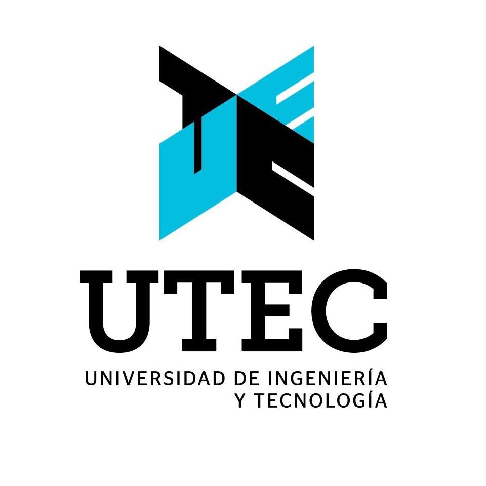 logo de la utec